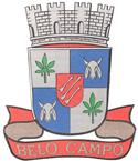 Brasão do município de Belo Campo - Bahia